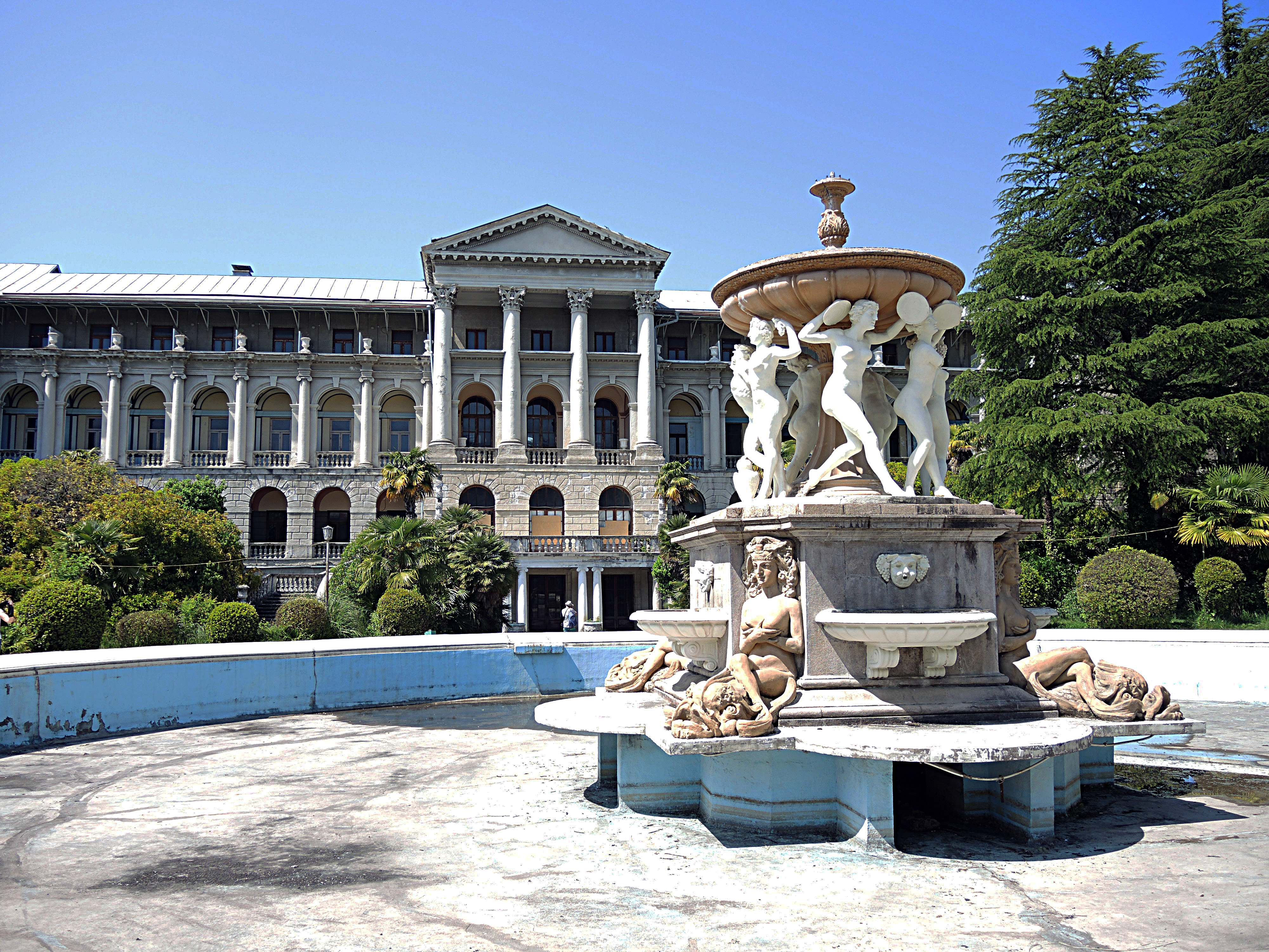 Санаторий им. С. Орджоникидзе: Курортный проспект, 96/5, Хостинский район, Сочи, Краснодарский край